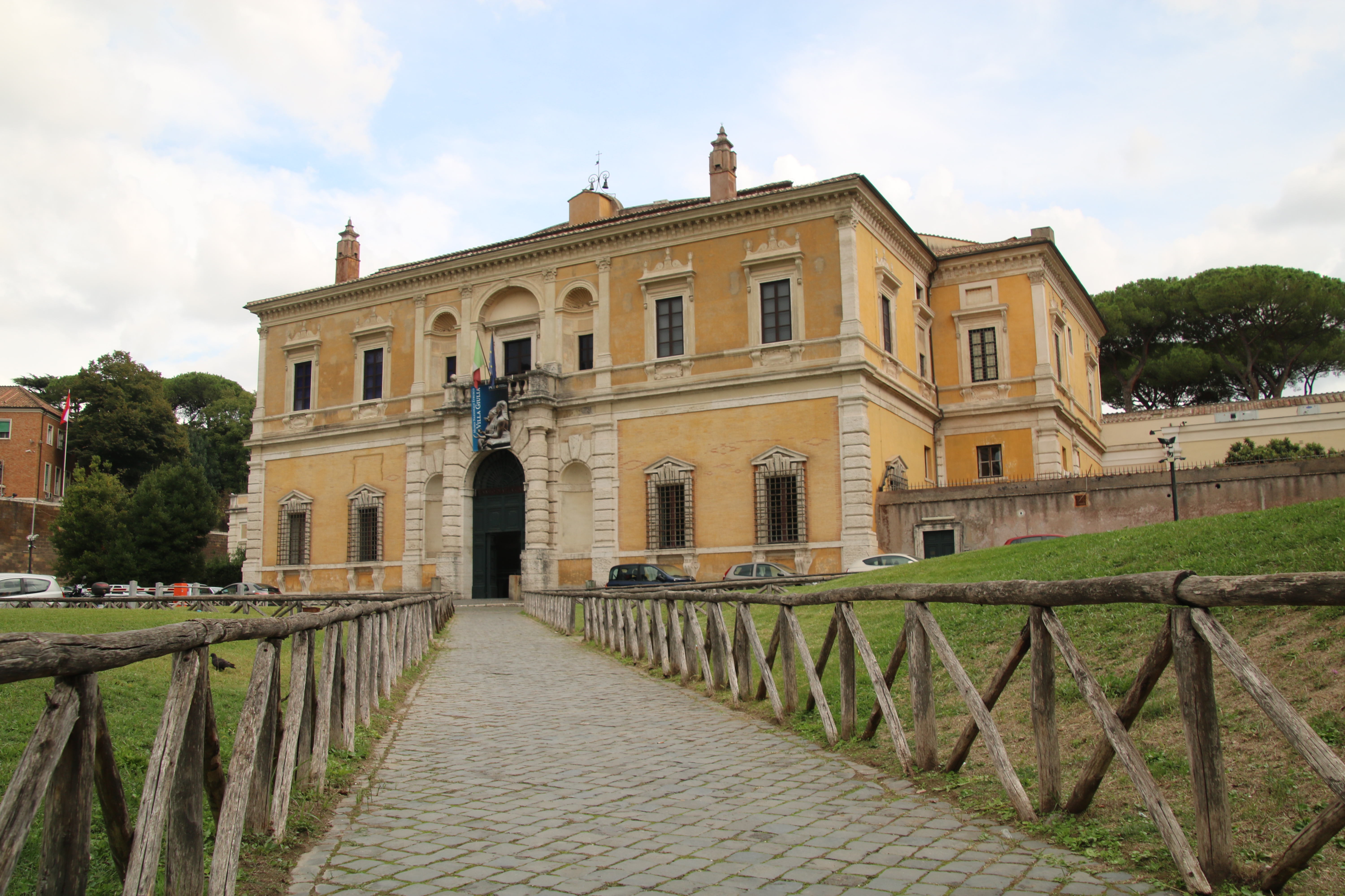 Villa Giulia (Roma) This is a photo of a monument which is part of cultural heritage of Italy.